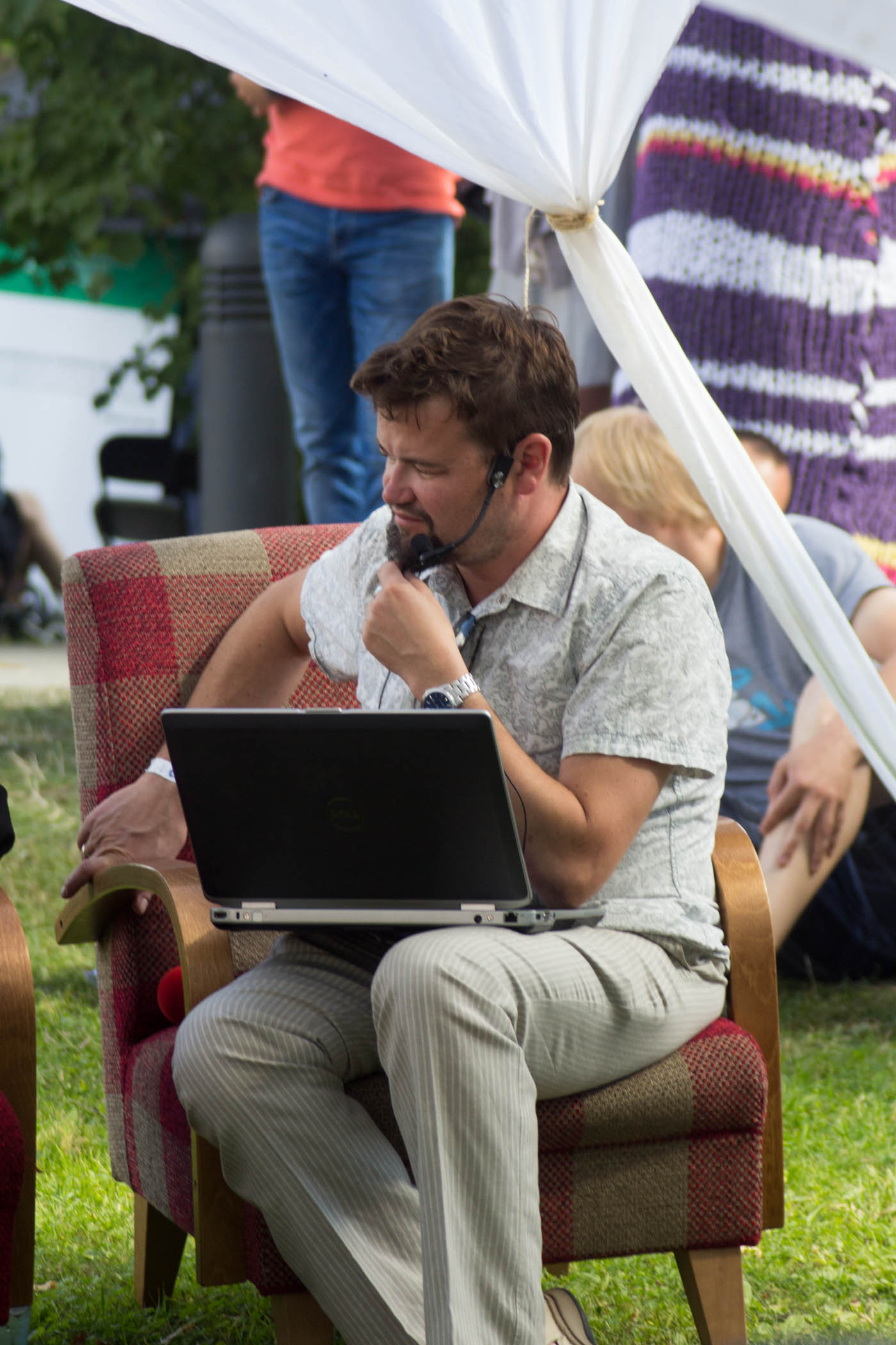 Arvamusfestival 2015, Ekspress Meedia ala. Teemaks "Pagulased Eestisse!?".